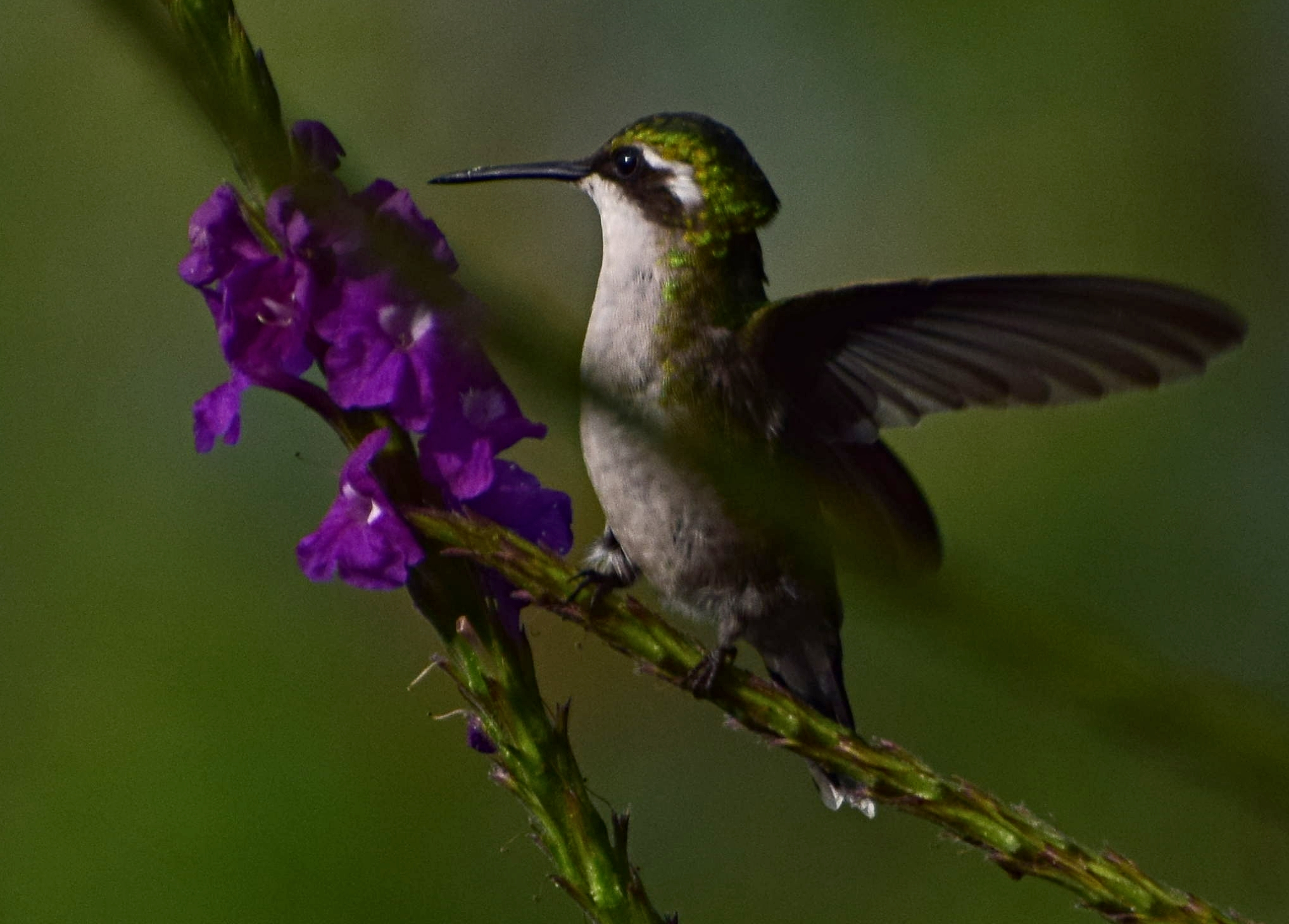 Chlorostilbon melanorhynchus (Esmeralda occidental) - Hembra